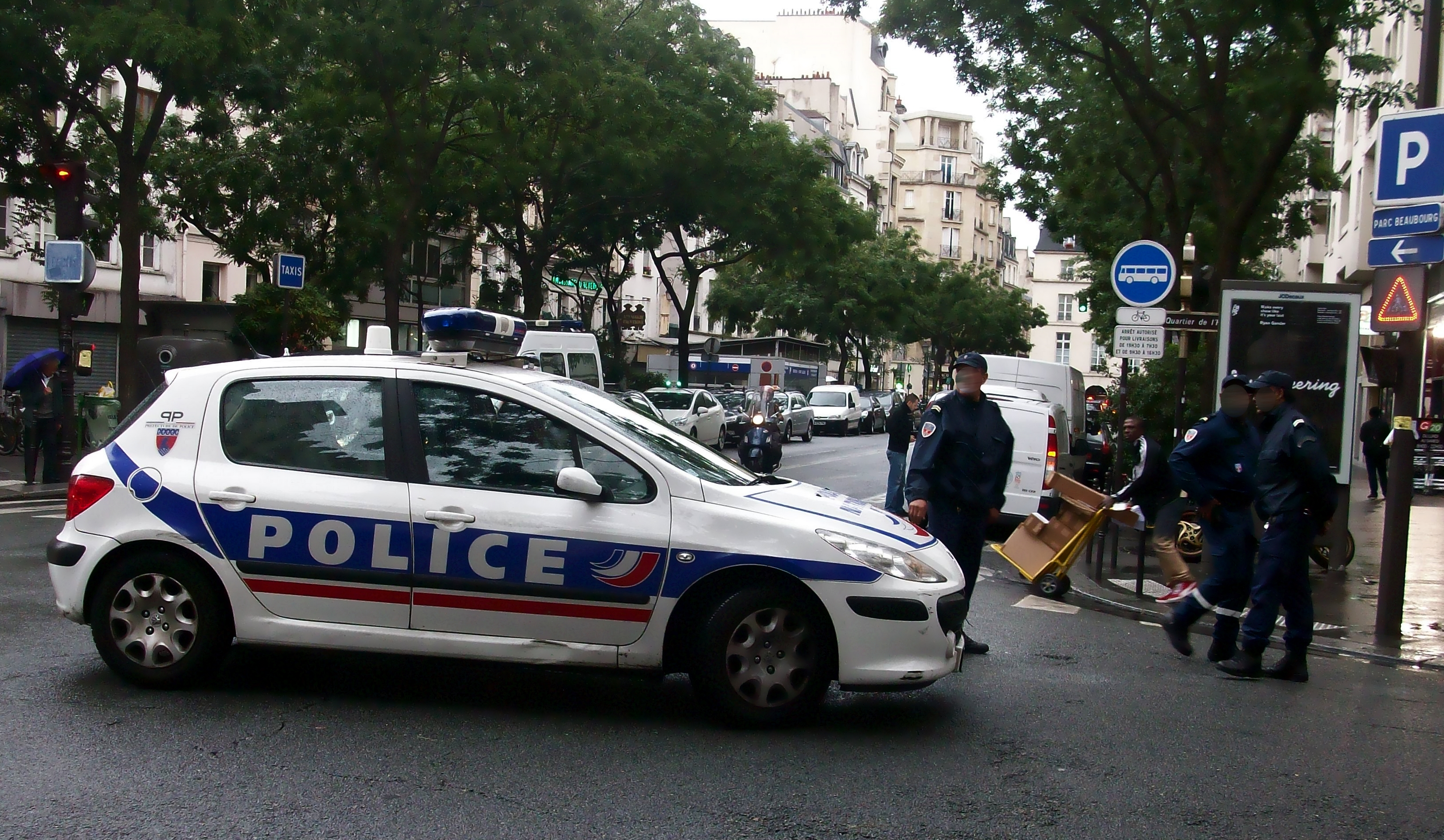 Fonctionnaires de police et Peugeot de la police nationale à Paris.